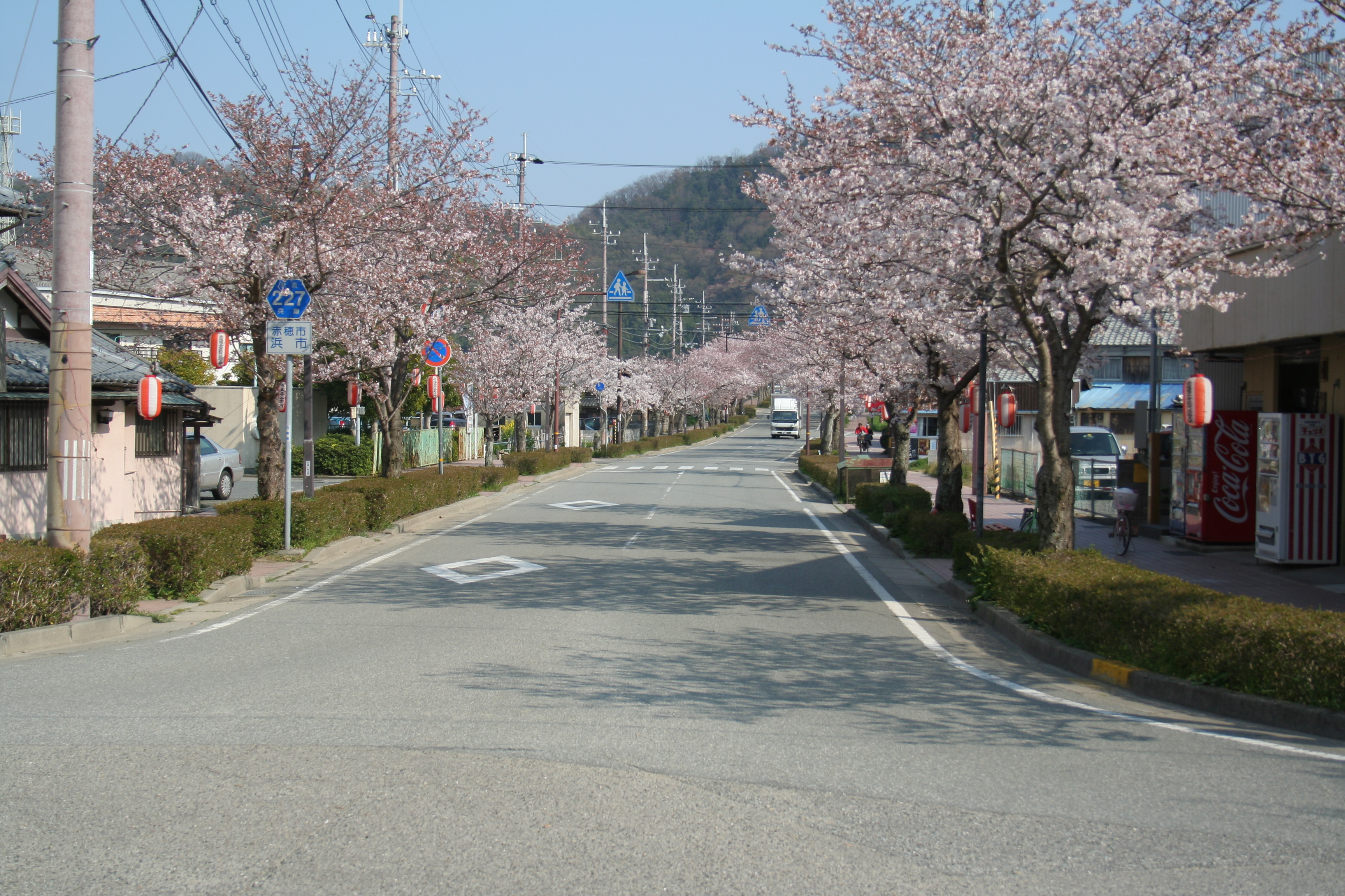 JR西日本の駅。坂越駅。 坂越駅前の道路。坂越駅から東部へ向かって撮影。